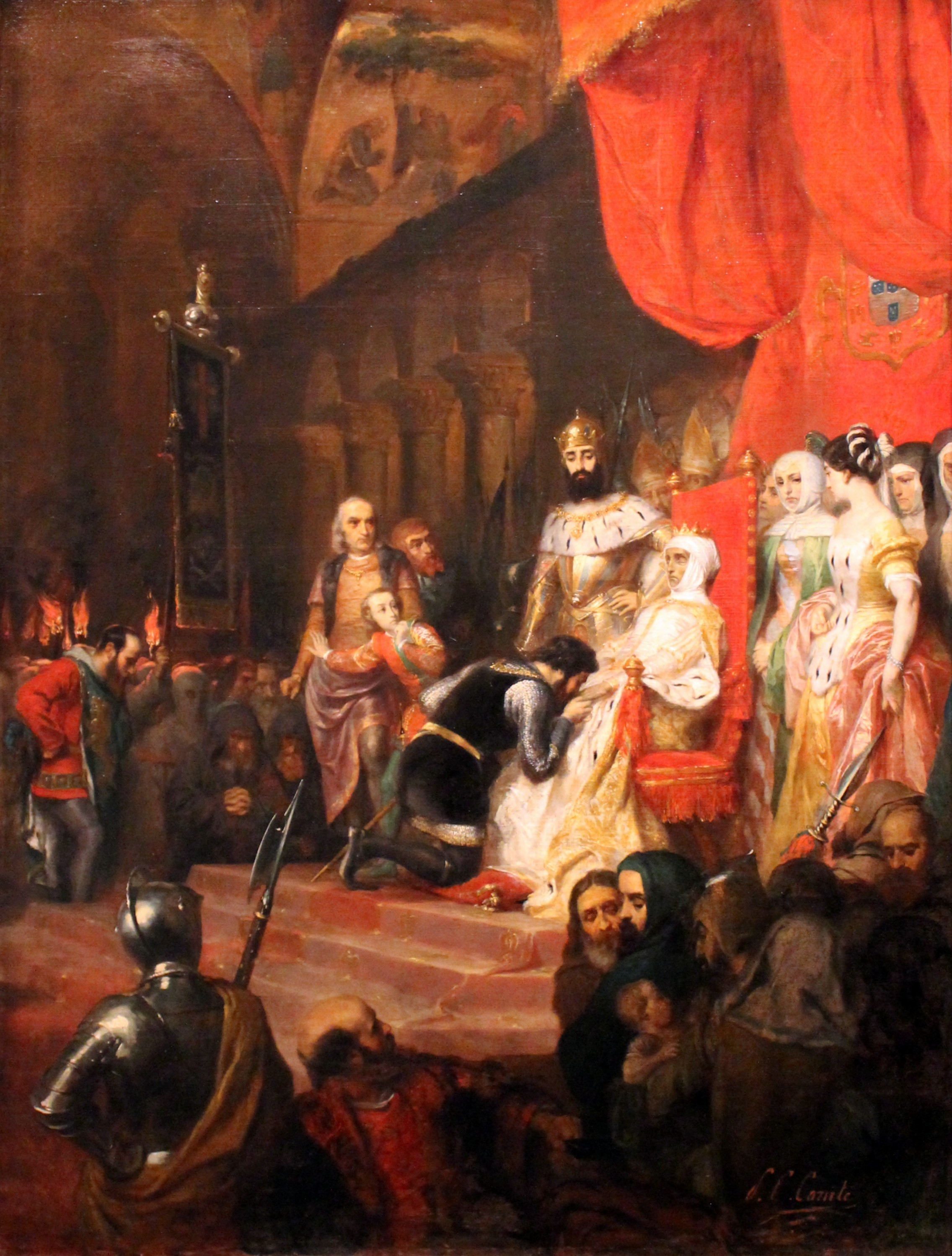 Le Couronnement d'Inès de Castro en 1361, peint par Pierre-Charles Comte vers 1849.